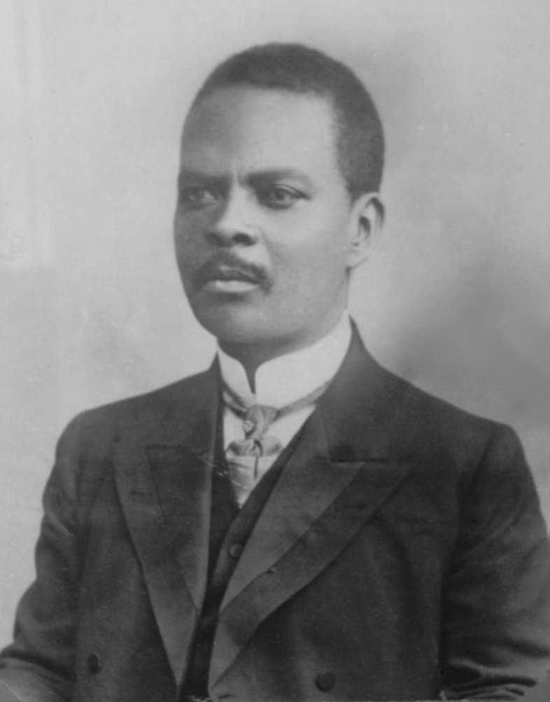 Coronel Francisco Dias Coelho (1864-1919), ex-prefeito da cidade de Morro do Chapéu, Bahia, Brasil.